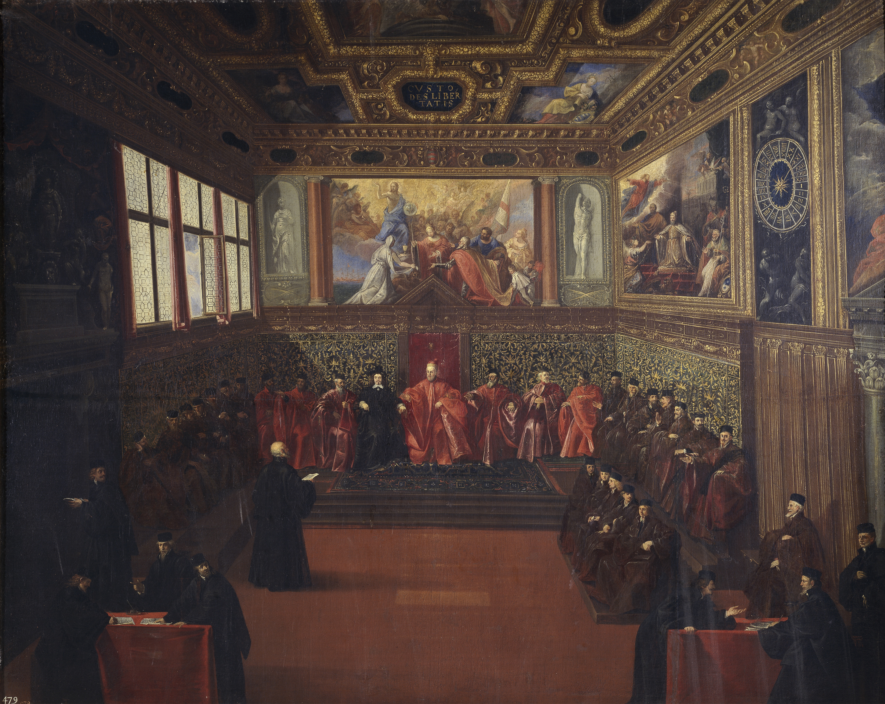 Die Audienz des spanischen Botschafters Don Alonso de la Cueva in der "Sala del Collegio" des Dogenpalasts 1604